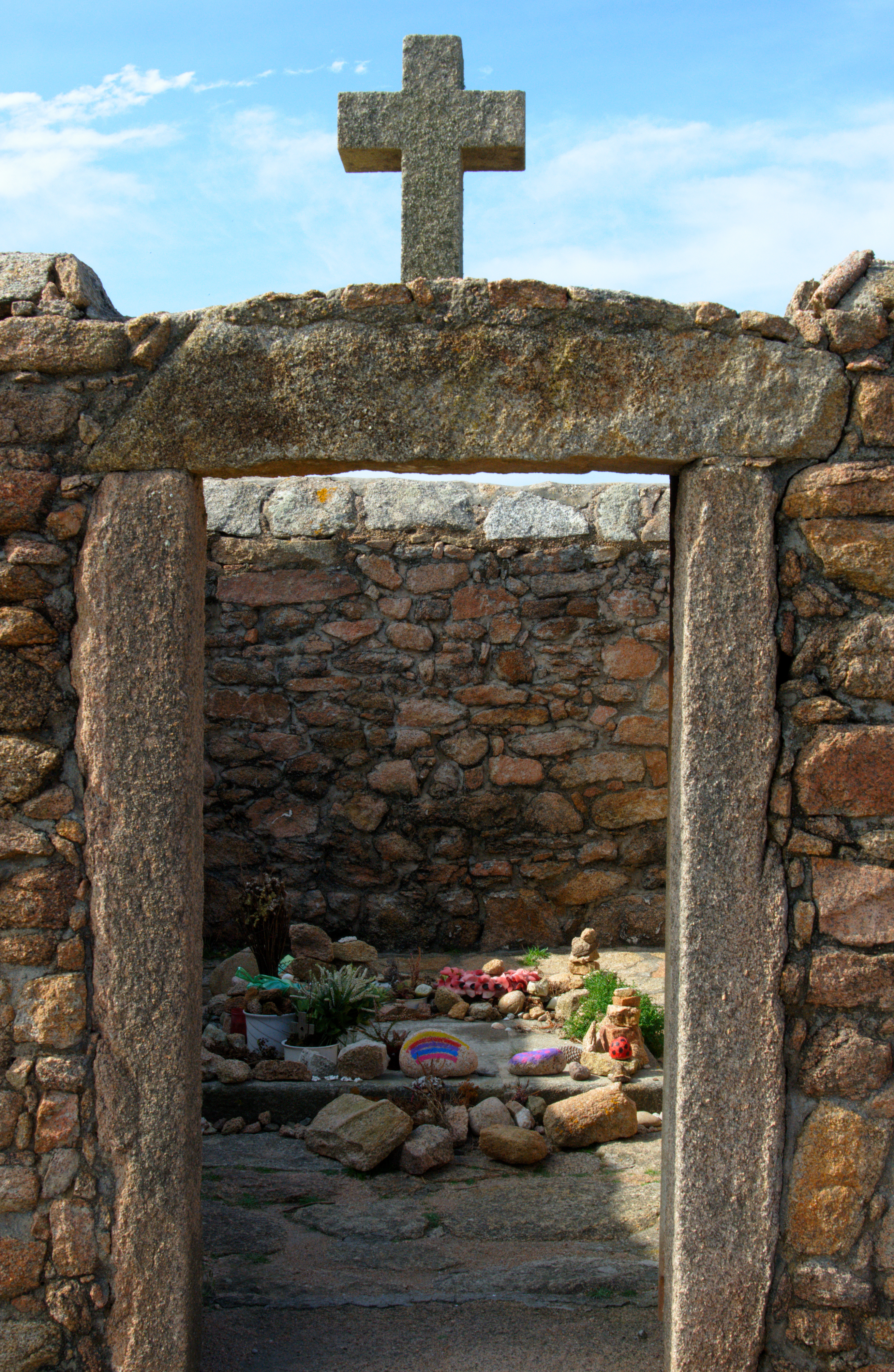 Cementerio de los Ingleses, Camariñas, Galicia